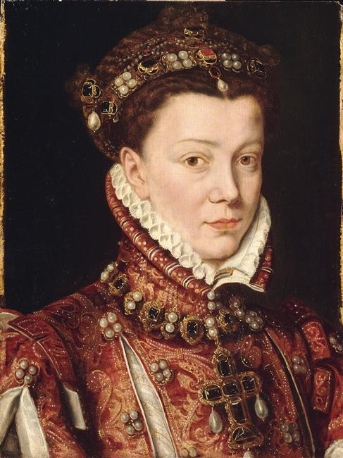 Sujet représenté portrait (Elisabeth de France, reine d'Espagne, femme, en buste, de trois-quarts, reine : Espagne, bijou, col) Lieu de conservation Paris ; musée du Louvre département des Peintures Musée de France au sens de la loi n°2002-5 du 4 janvier 2002 renseignements sur le musée Statut juridique propriété de l'Etat ; mode d'acquisition inconnu ; musée du Louvre département des Peintures Ancienne appartenance ancien fonds Dépôt / chgt affectation Attribution ; musée du Louvre département des Peintures Genèse copie ; oeuvre en rapport Historique copie partielle d'un original conservé autrefois à Eindhoven dans la collection Philips Attribution POURBUS LE JEUNE FRANS, ECOLE DE (ancienne attribution) ; FLANDRES, 16E SIECLE (ancienne attribution) Bibliographie FRIEDLANDER XIII 397 ; C.S.I. 1, P. 94